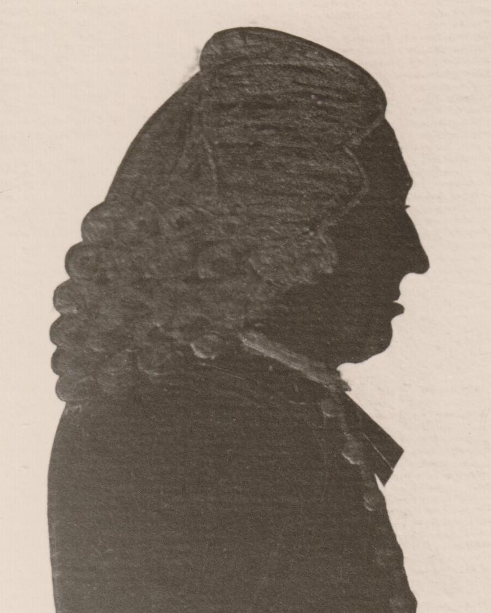 Gustav Friedrich Gebser (1694 in Kelbra - 1766 in Sittichenbach), Kurfürstlich Sächsischer Amtmann zu Sittichenbach, Schwiegervater des Fürstlichen Amtsverwalters Ludwig Bernhard Schneidewind (1735-1790) in Heringen Helme.